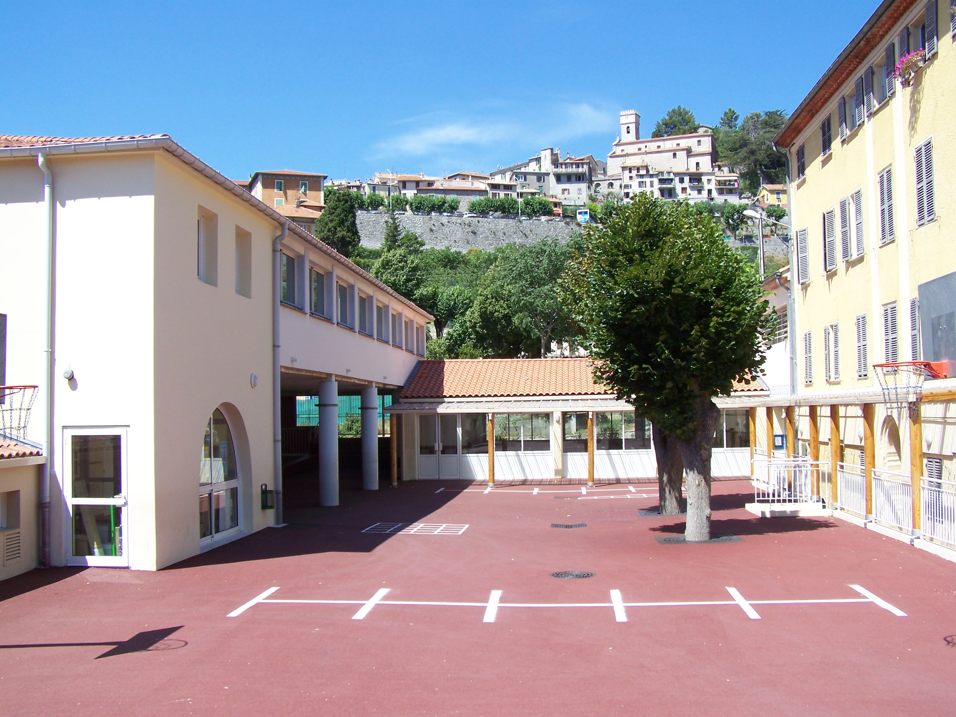 Cour de l'école communale primaire de Levens (Alpes-Maritimes, France), avec à droite le premier bâtiment des années 1860.